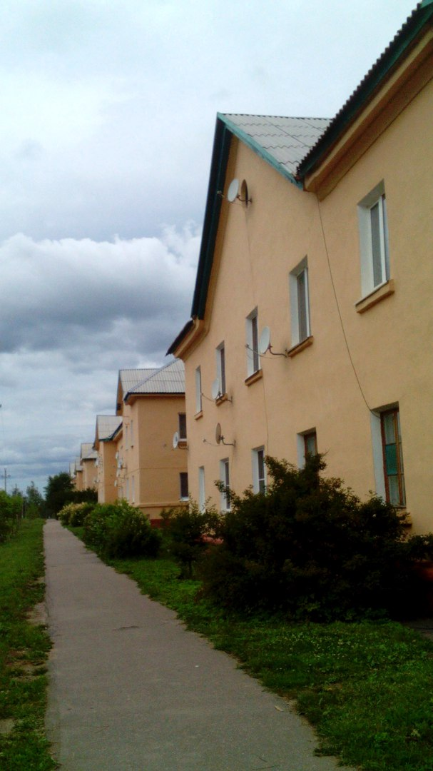 Застройка в центре Починка.